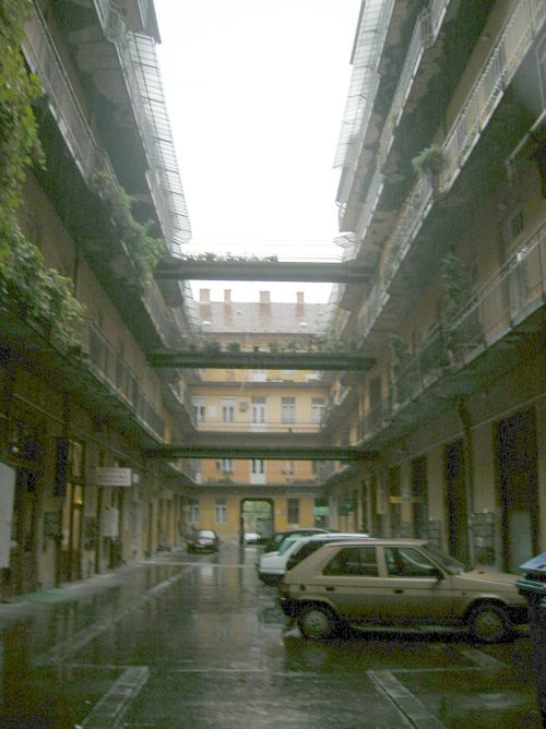 Weidlich-palota, 19 Széchenyi Street, Miskolc, Hungary